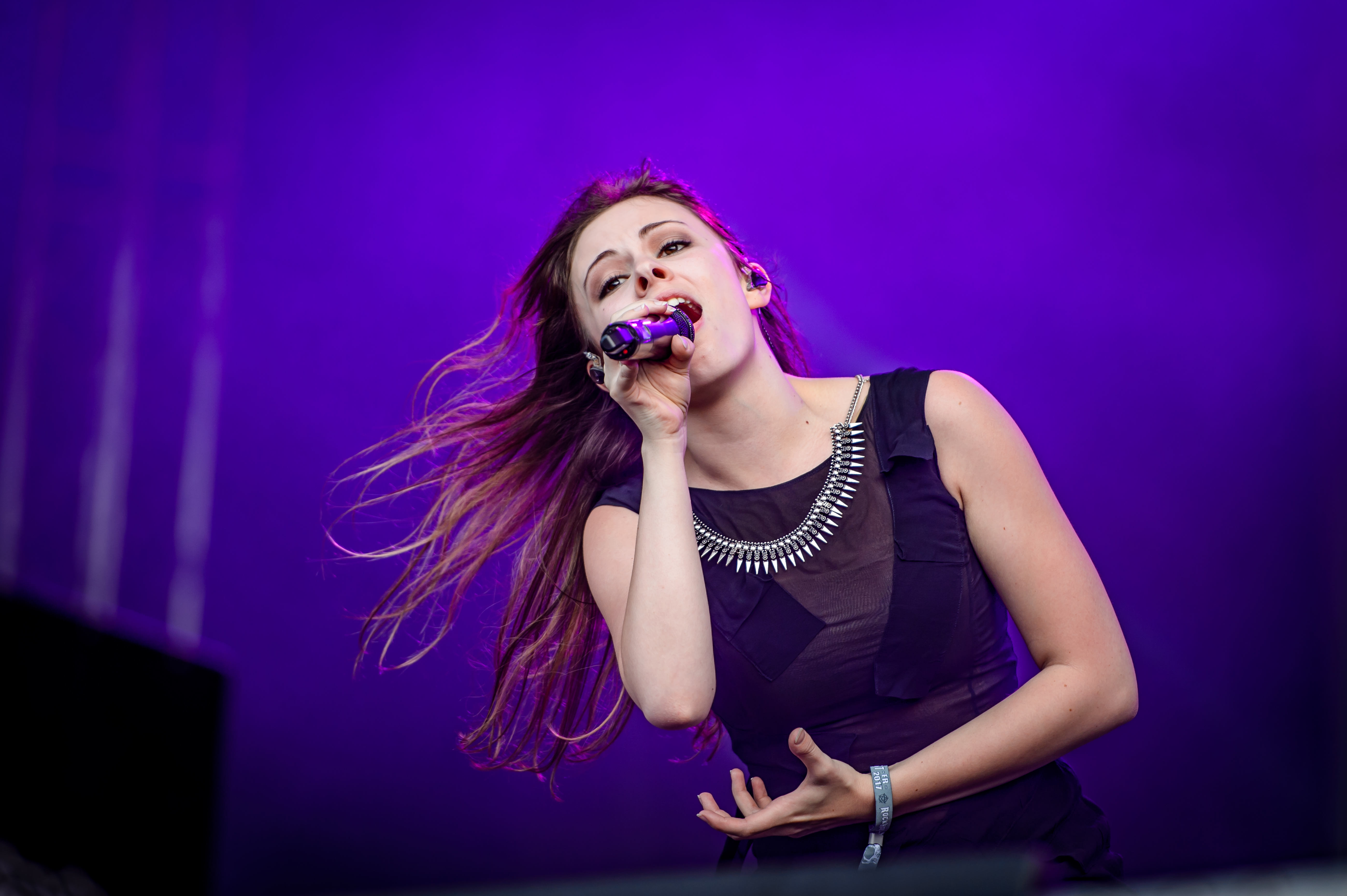 'RockHarz Open Air 2017; Ballenstedt': 'Beyond the Black'